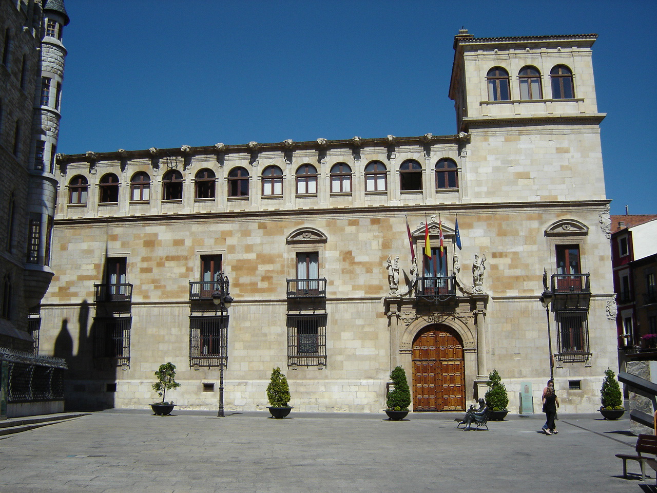 Palacio de los Guzmanes, sede de la Diputación Provincial de León.